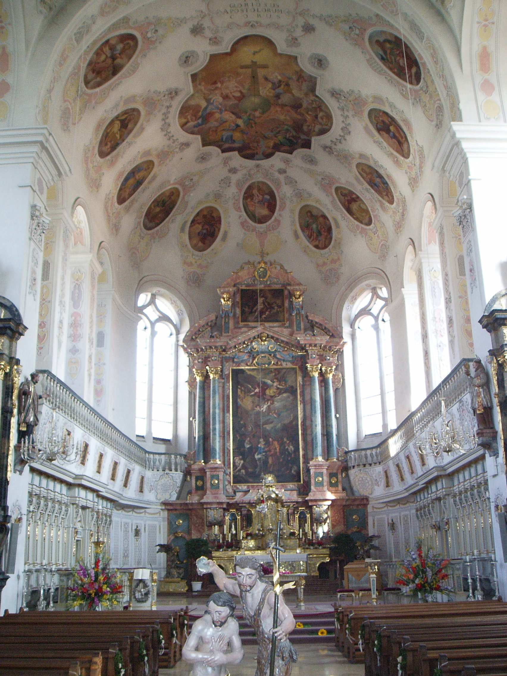 Altarraum der Basilika St. Peter (Dillingen)